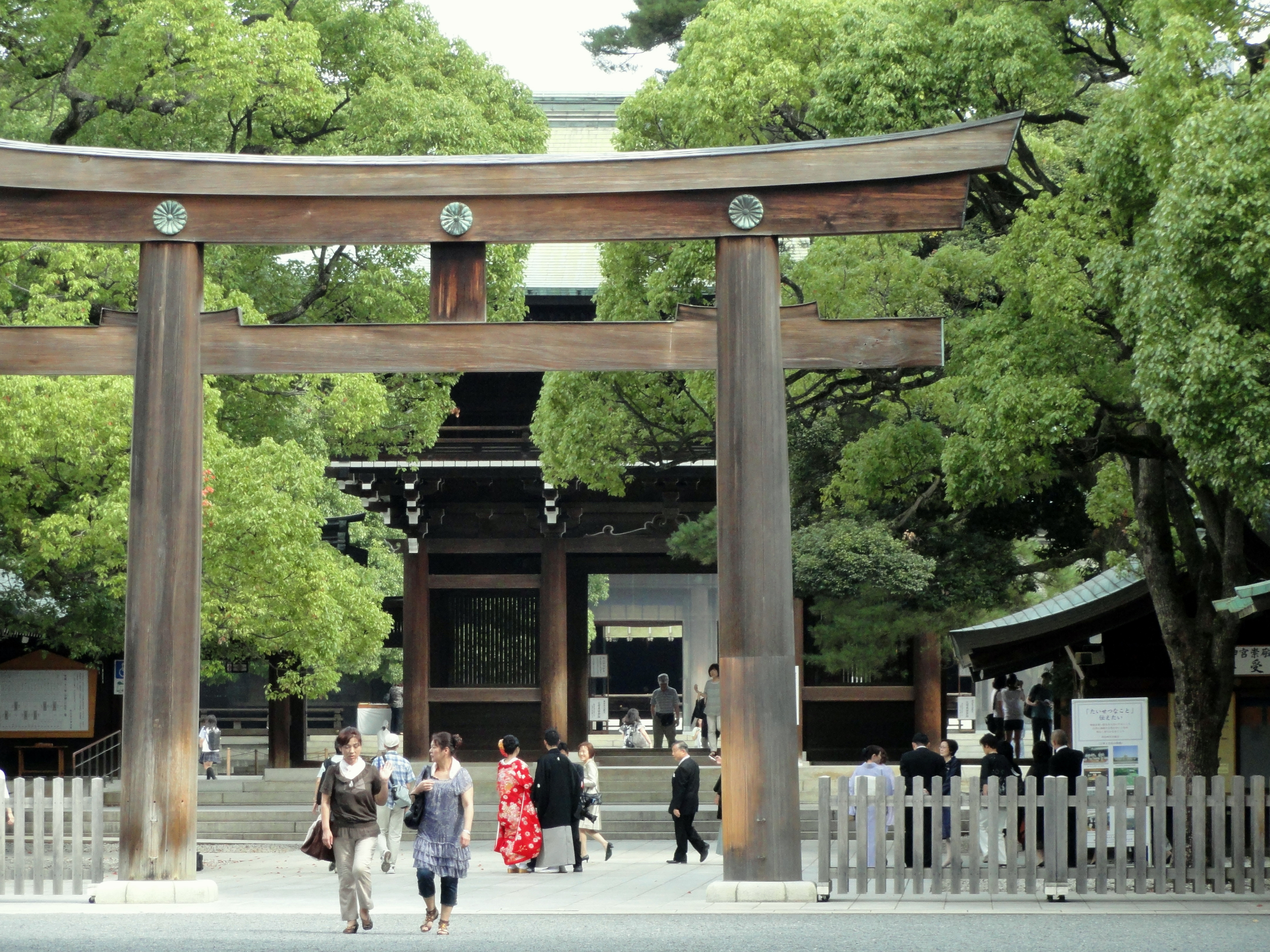 Meiji Shrine, Shinjuku, Tokyo, Japan.